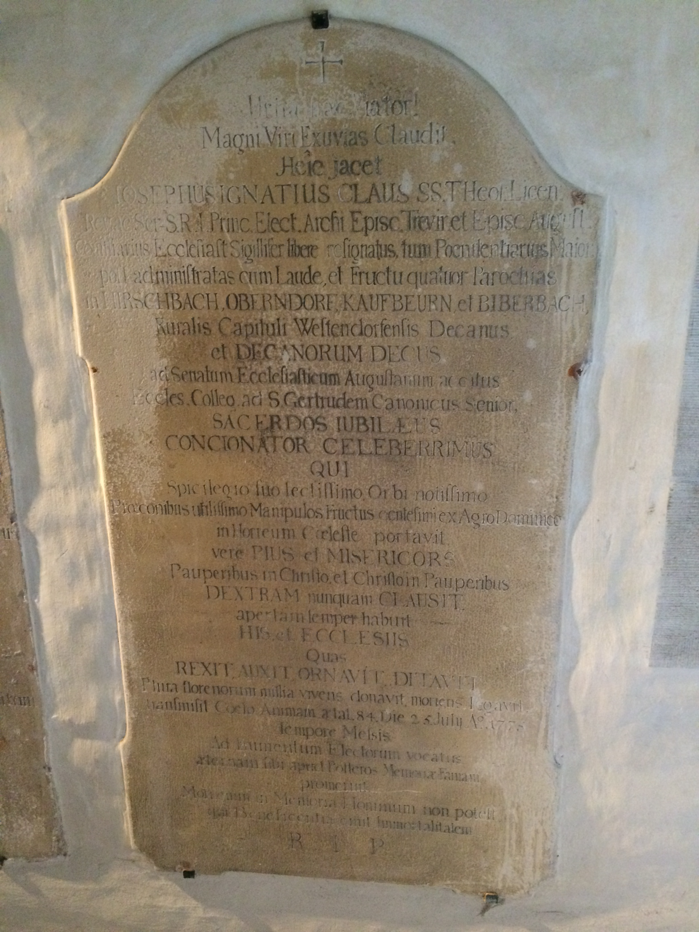 Epitaph von Joseph Ignatz Claus in der Umbauung des Kreuzhofes des Augsburger Domes (Westflügel, 5. Joch von Norden, Ostwand., Text bei Franz Anton Veith: Bibliotheca Augustana, complectens notitias varias de vita et scriptis eruditorum,quos Augusta Vindelica orbi litterato vel dedit vel aluit. im Eigenverlag, Augsburg 1785, Alphabetum I (in den Digitalen Sammlungen der Universitätsbibliothek Augsburg), Seite 36 ff.)